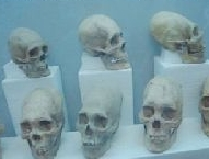 Foto tirada por mim, em Tiwanaku.